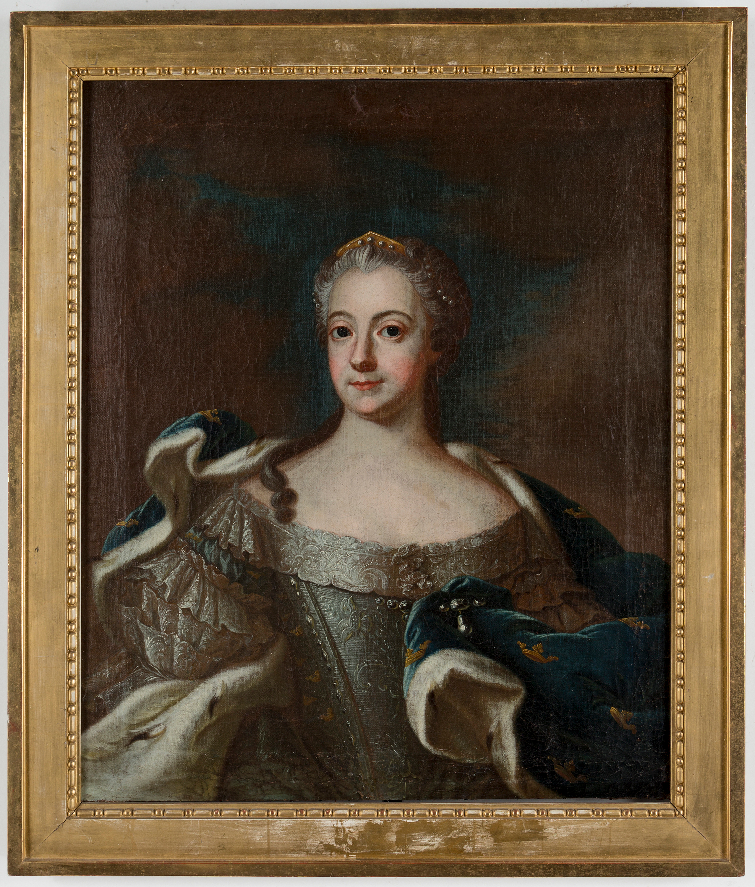 Drottning Lovisa Ulrika iklädd klänning av silverduk, samt draperad i en furstlig mantel i blått. Avporträtterad av Olof Arenius, efter original av Gustaf Lundberg. Målning innan 1751.